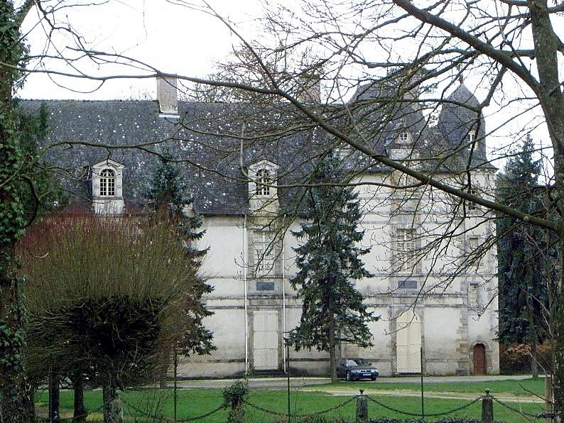 Château de l'Espinay à Champeaux (35).